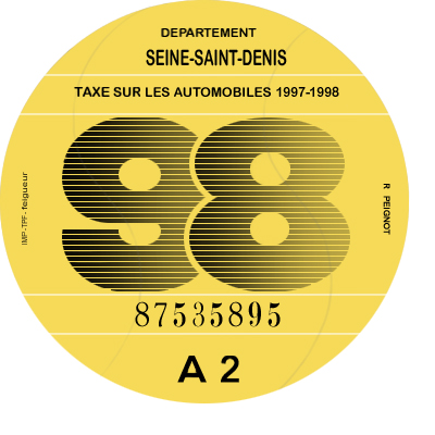 Vignette automobile 1998